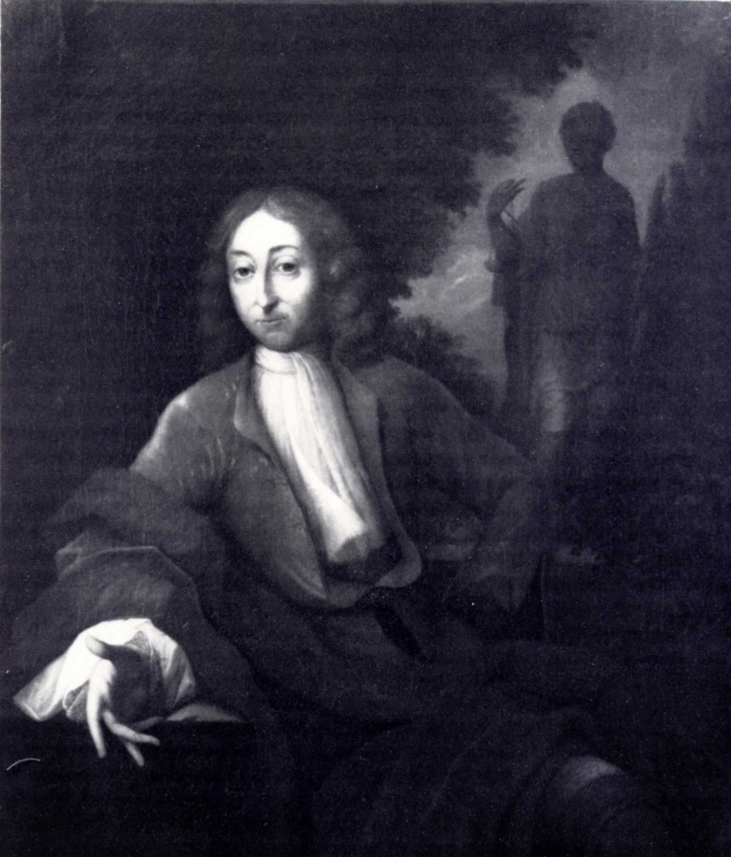 Willem van den Kerckhoven (1678-1758), baljuw en burgemeester van Gouda, lid van de Raad van Statetitle QS:P1476,nl:"Willem van den Kerckhoven (1678-1758), baljuw en burgemeester van Gouda, lid van de Raad van State" label QS:Lnl,"Willem van den Kerckhoven (1678-1758), baljuw en burgemeester van Gouda, lid van de Raad van State"